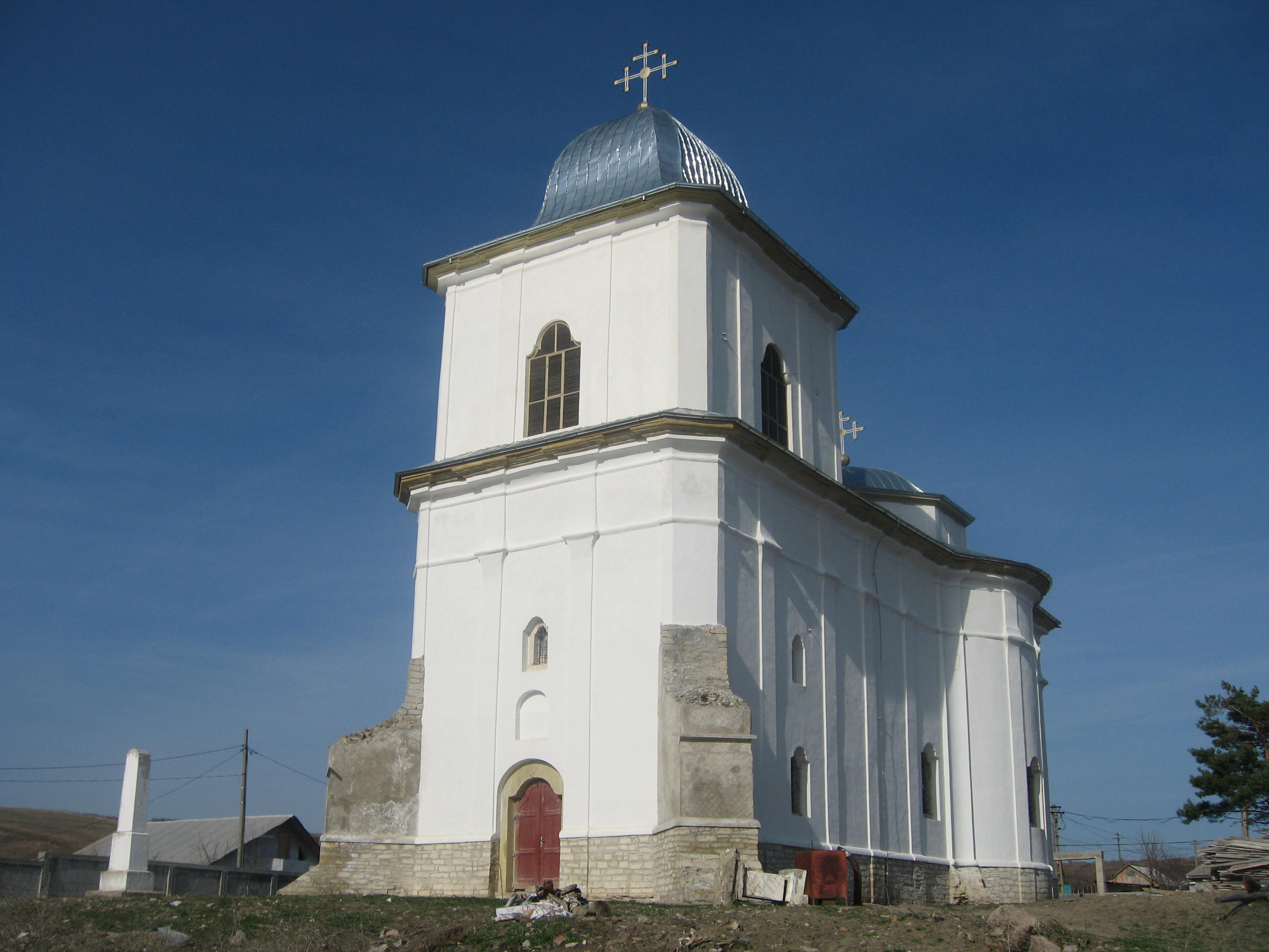 Biserica Schimbarea la Față din Cucuteni, comuna Lețcani, jud. Iași, România